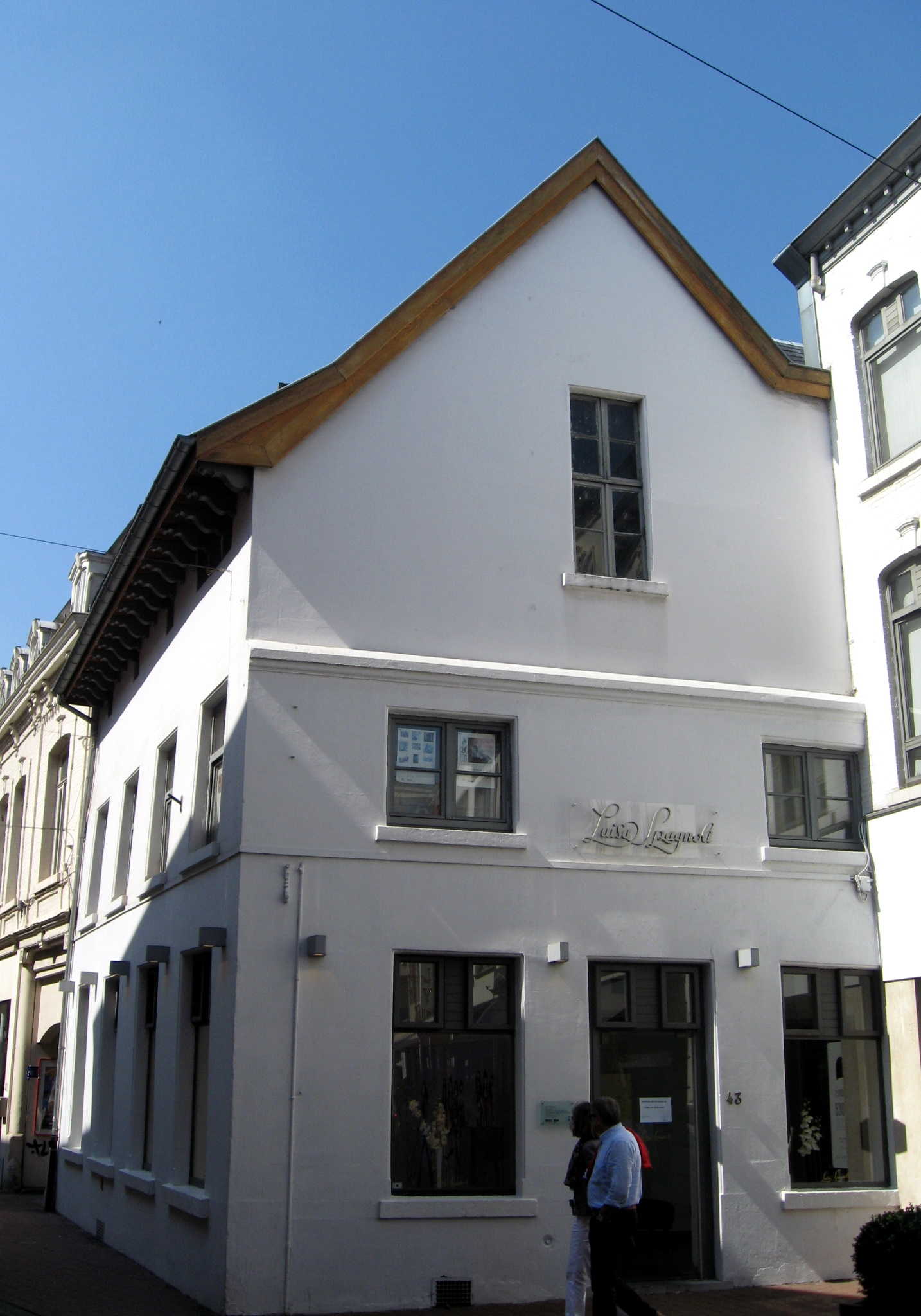 Huis De Groote Pellicaen, voormalige herberg in Hasselt